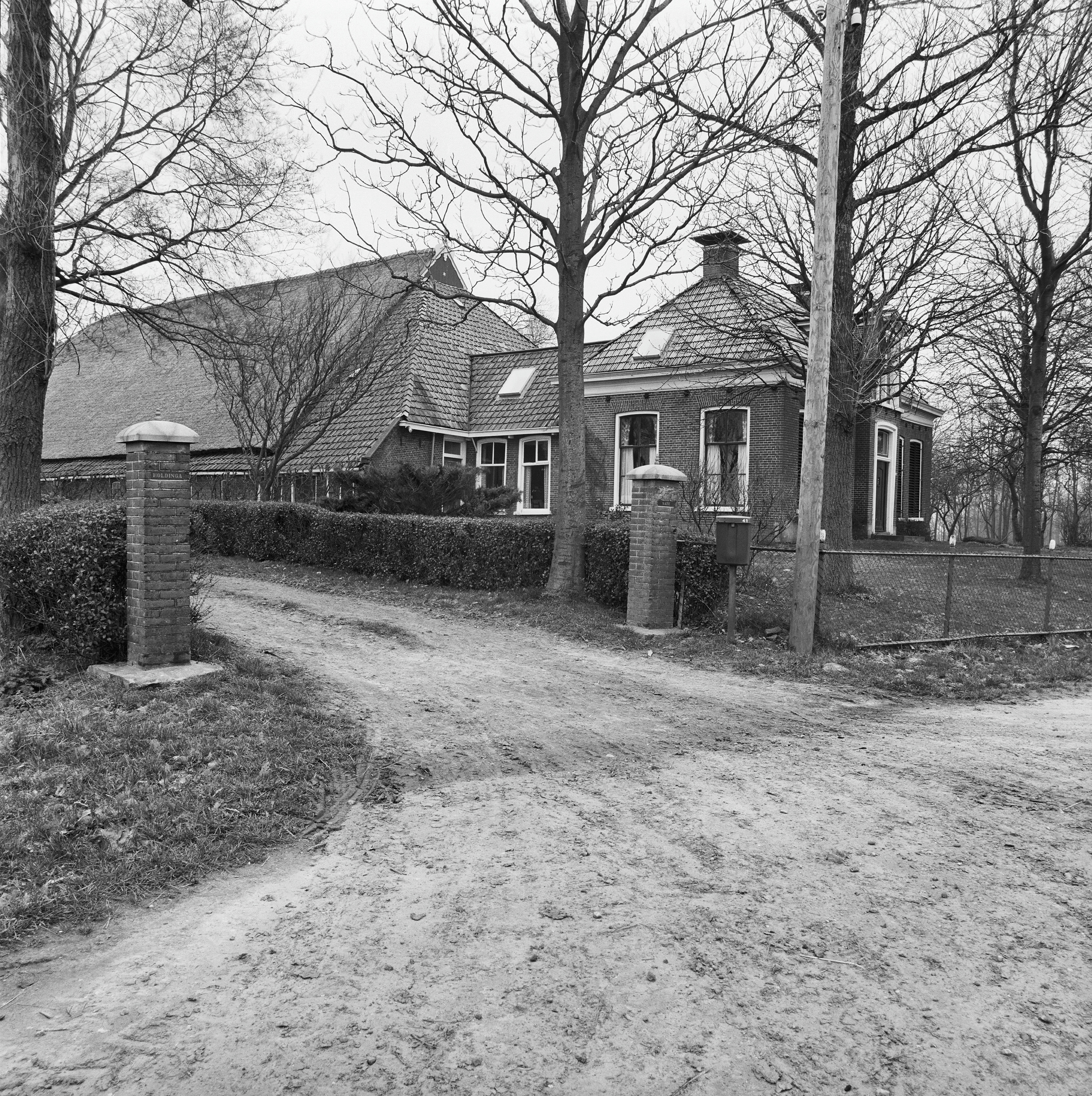 linker zijgevel